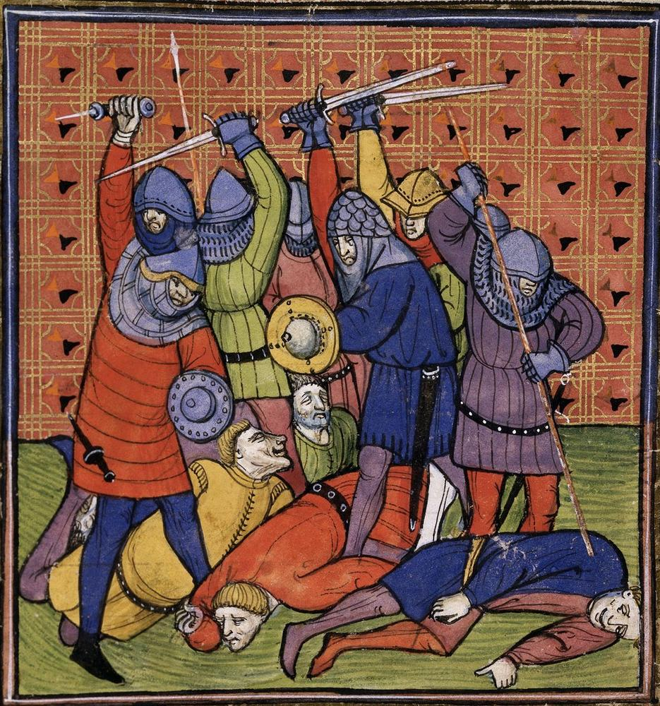 Середньовічна мініатюра: Жакерія